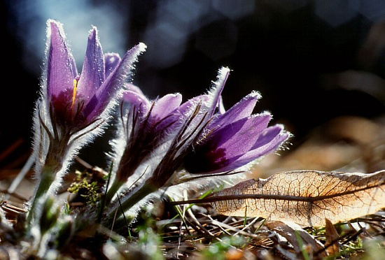 Pulsatilla vulgaris